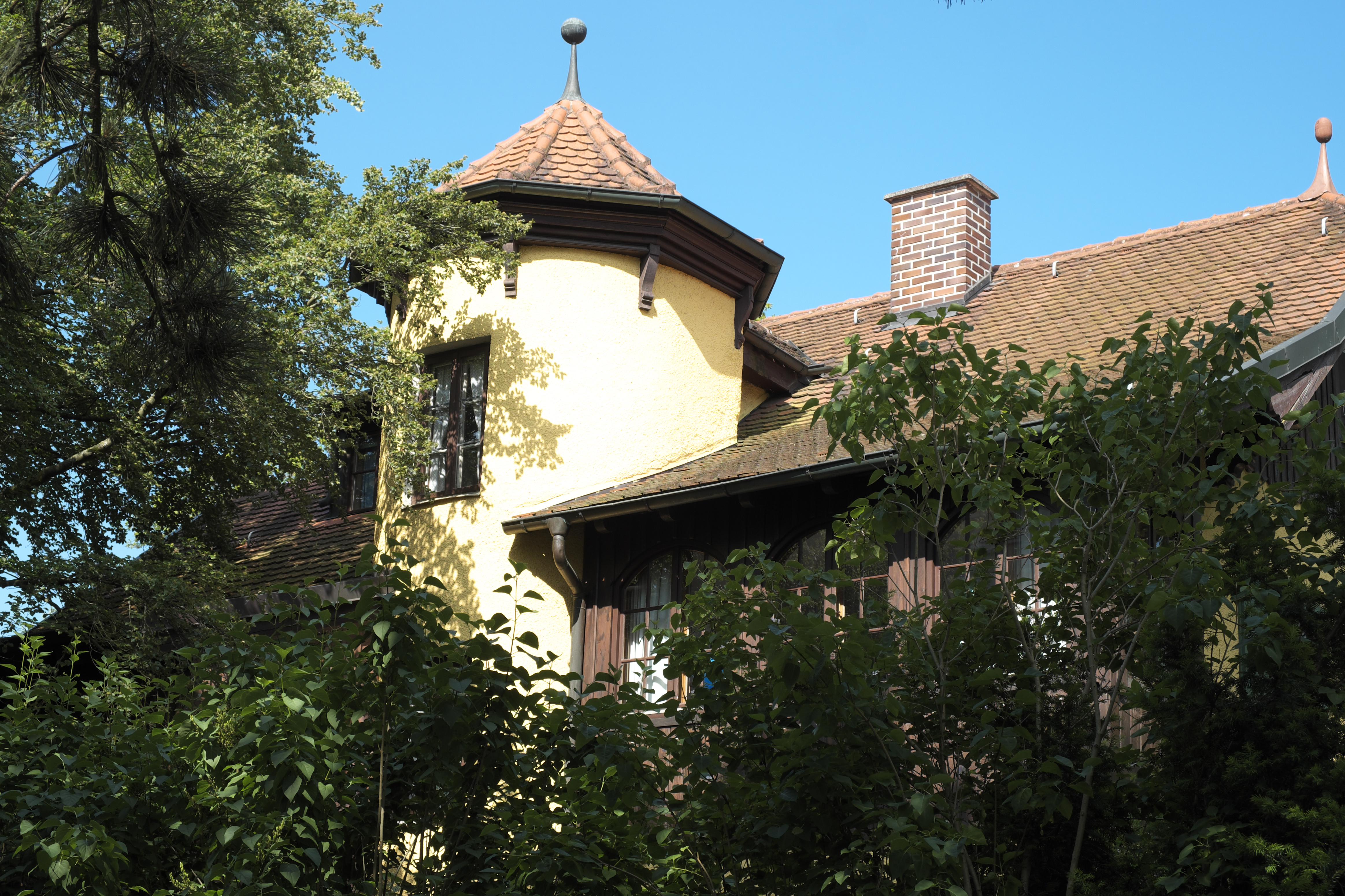 Villa in der Marschnerstraße 33 in Pasing im Stadtbezirk Pasing-Obermenzing in München (Bayern/Deutschland)